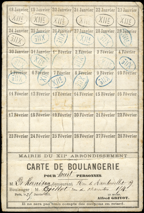 Brotkarte für die Bevölkerung während der deutschen Belagerung von Paris im Jahr 1871